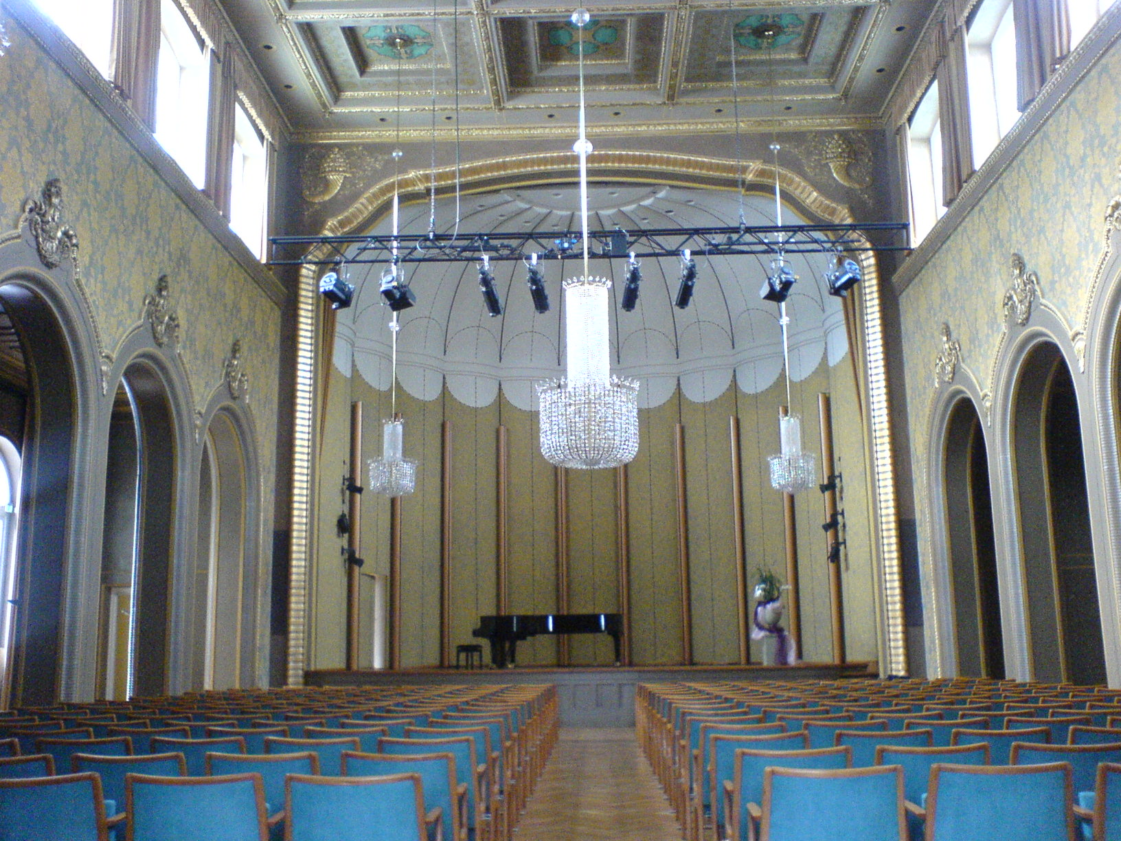 Rossini-Saal (Blick auf die Bühne), Bad Kissingen.